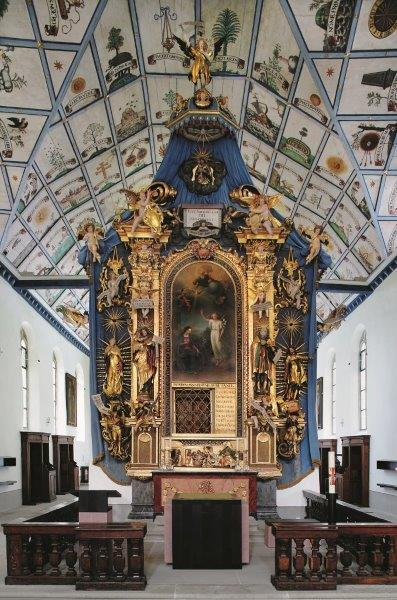 Hochaltar Wallfahrtskirche Hergiswald